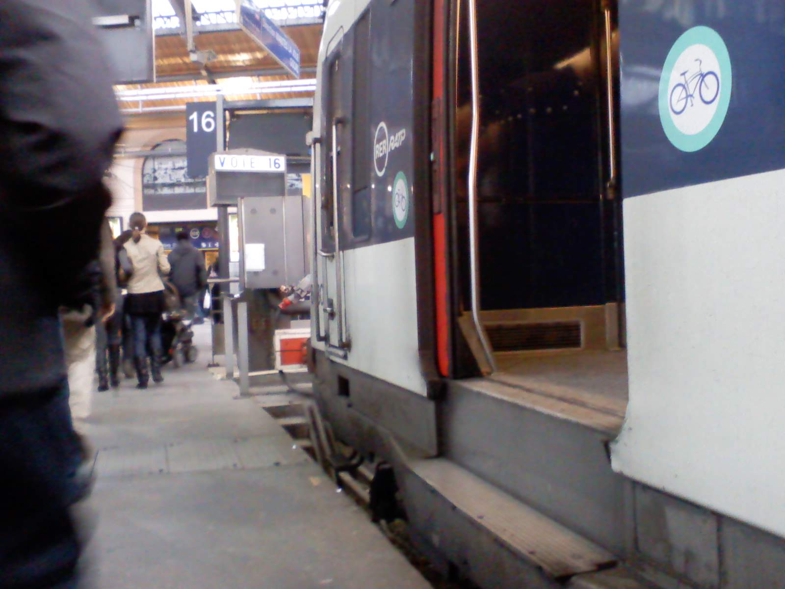 Marchepied mobile d'une rame MI84 (motrice ZBD8480), voie 16 de la gare Saint-Lazare (Paris), en position basse.